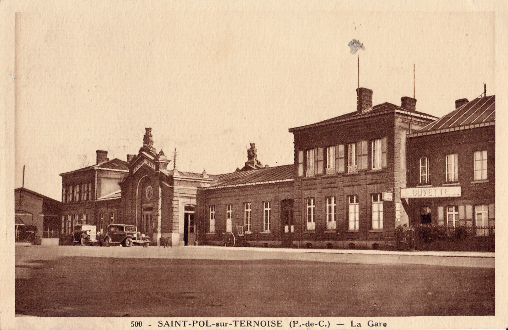 Carte postale ancienne éditée par Abeille de la Ternoise, n°500 : SAint-POL-SUR-TERNOISE - La Gare